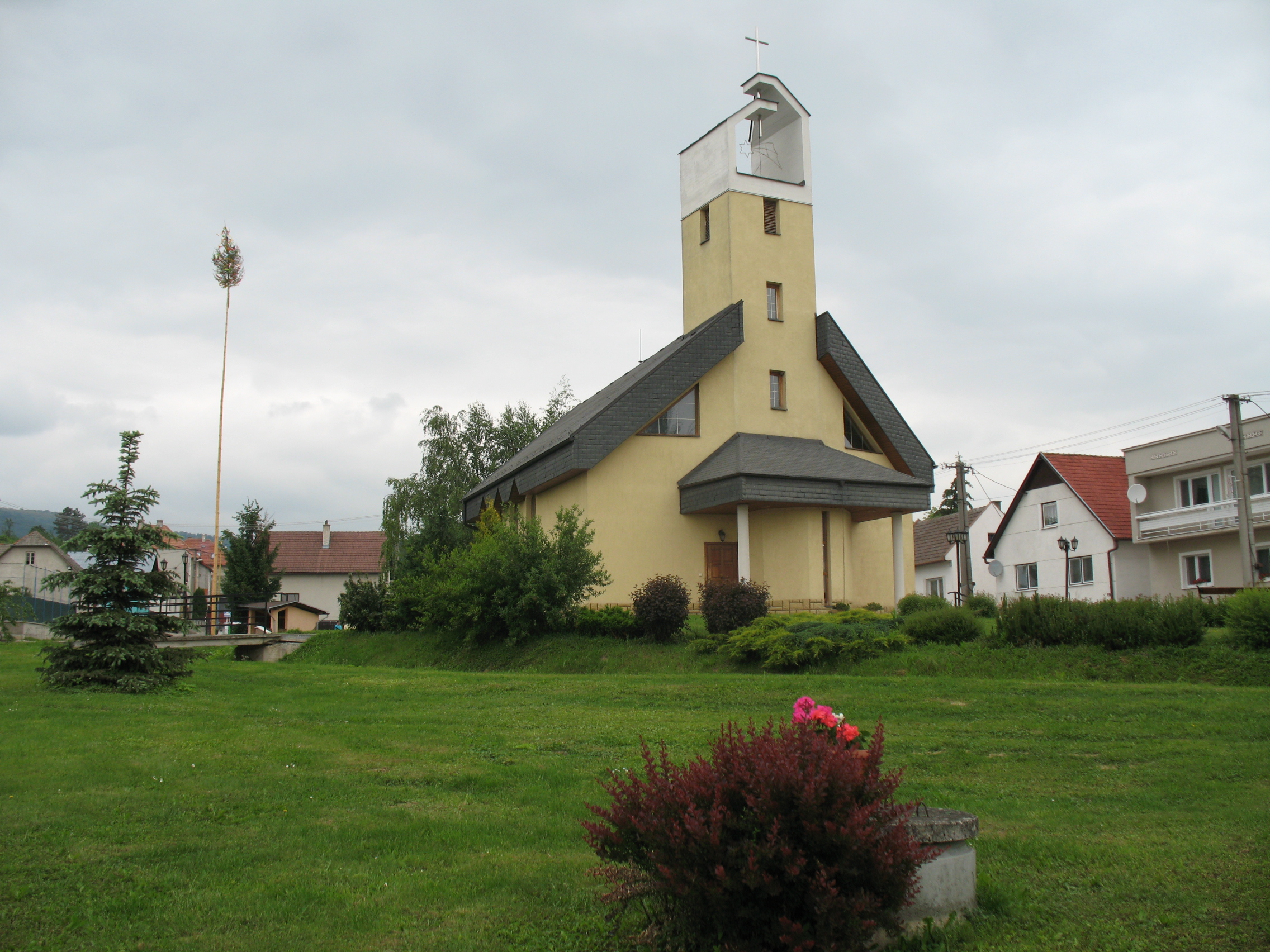 Szedmerőc